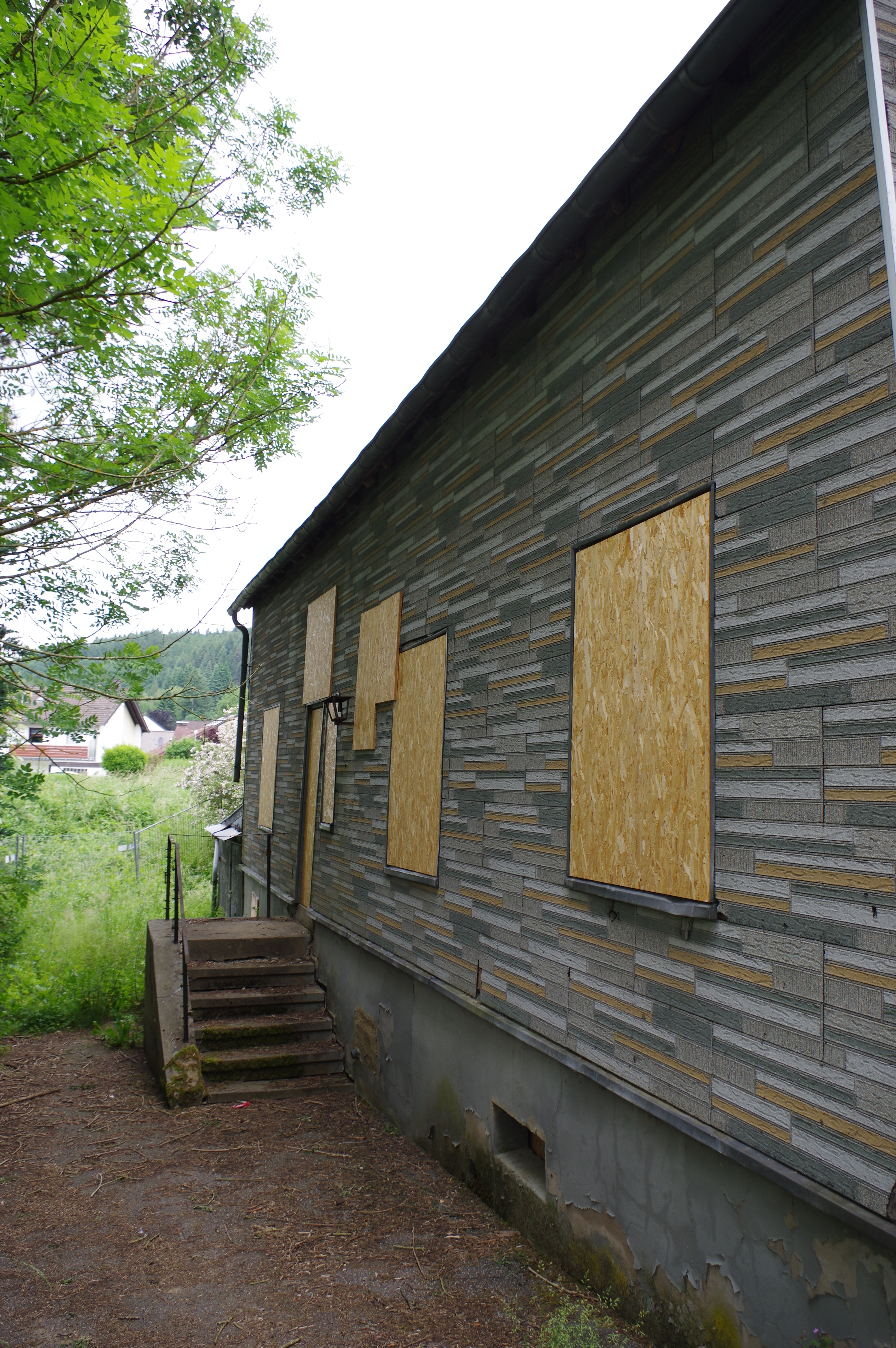 Hellenthal, Hardtstr. 2, Südseite